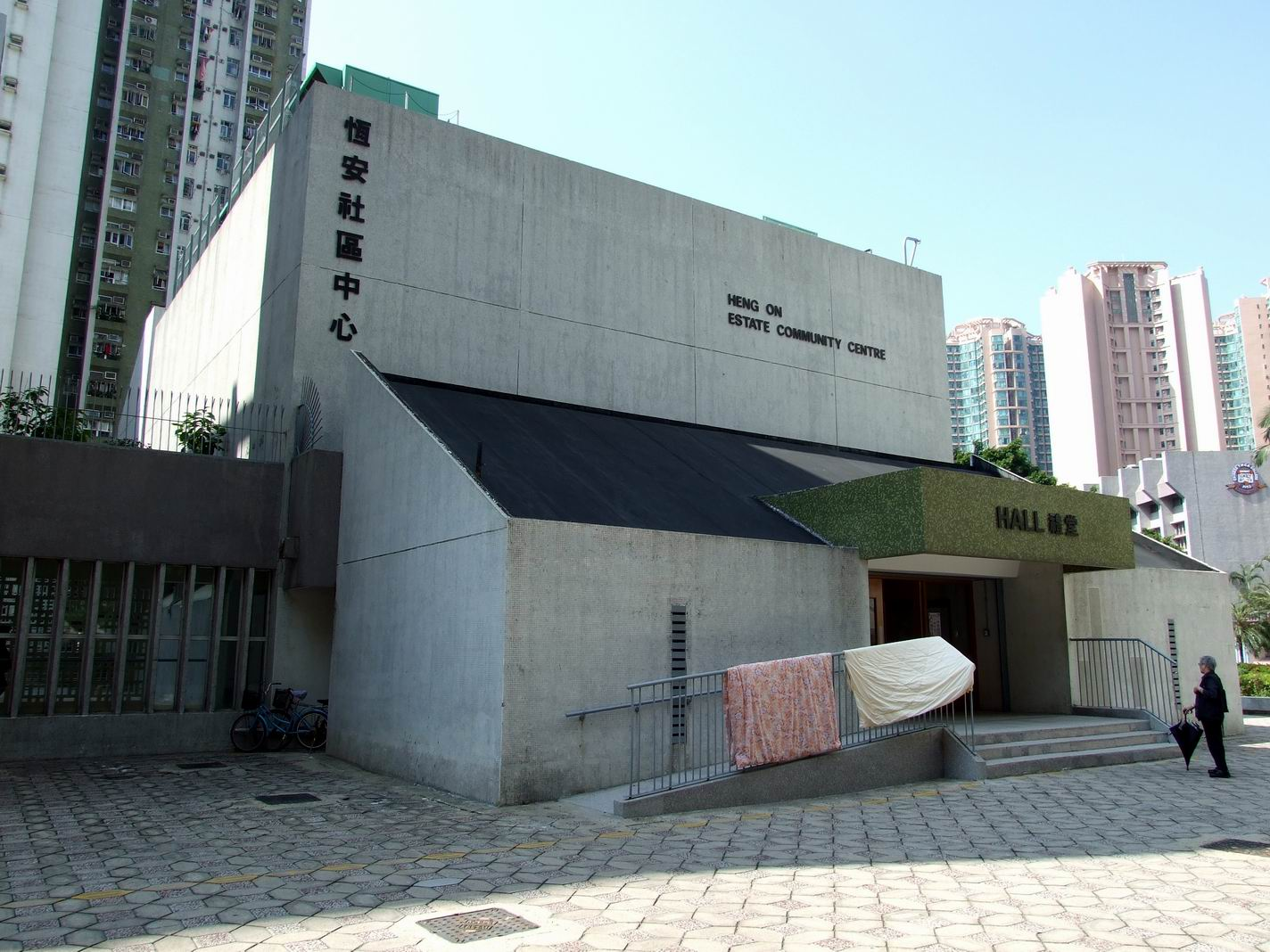 恆安邨社區中心